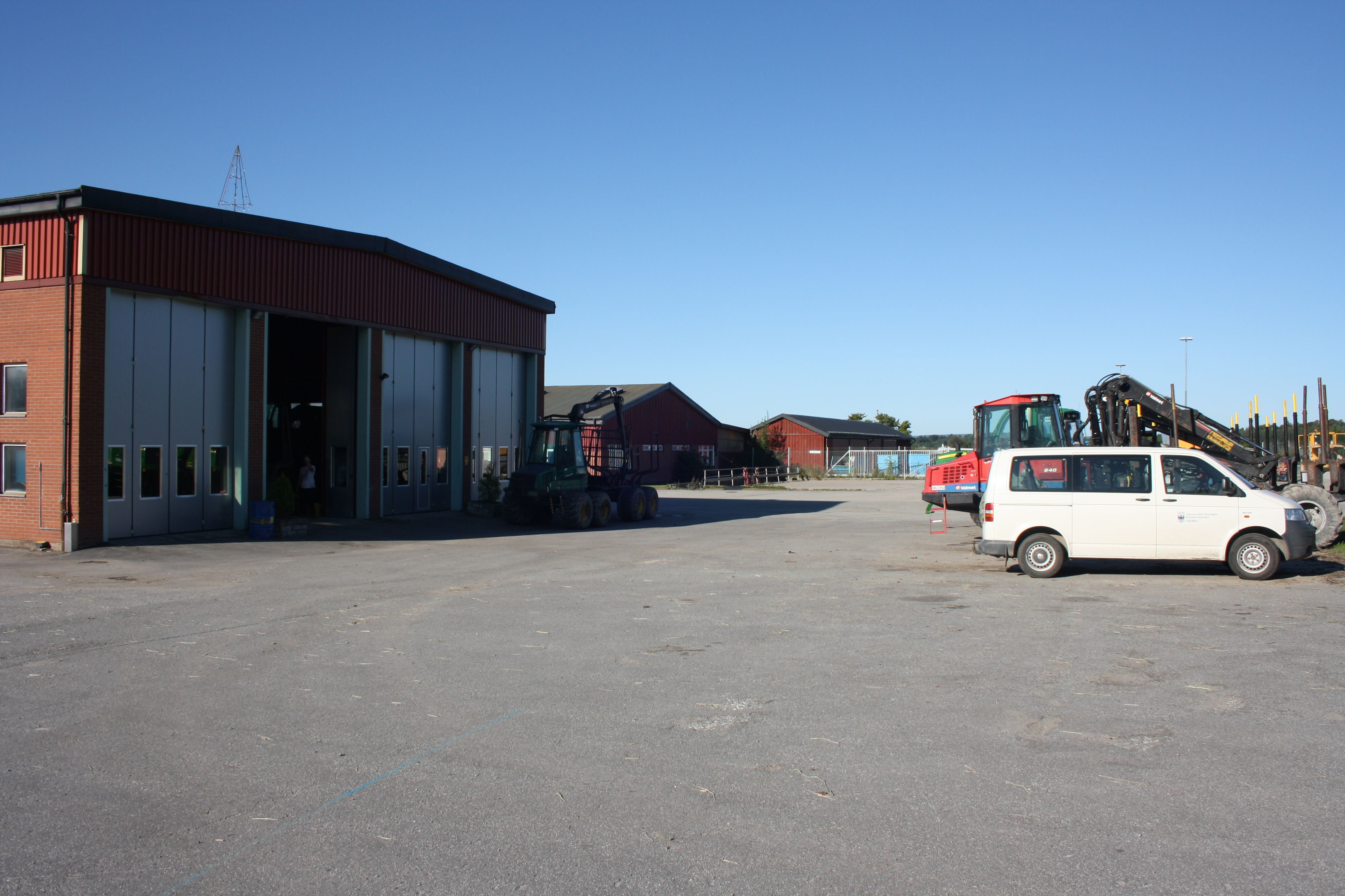 Tegelbyggnaden till vänster är en av skolans två verkstäder.